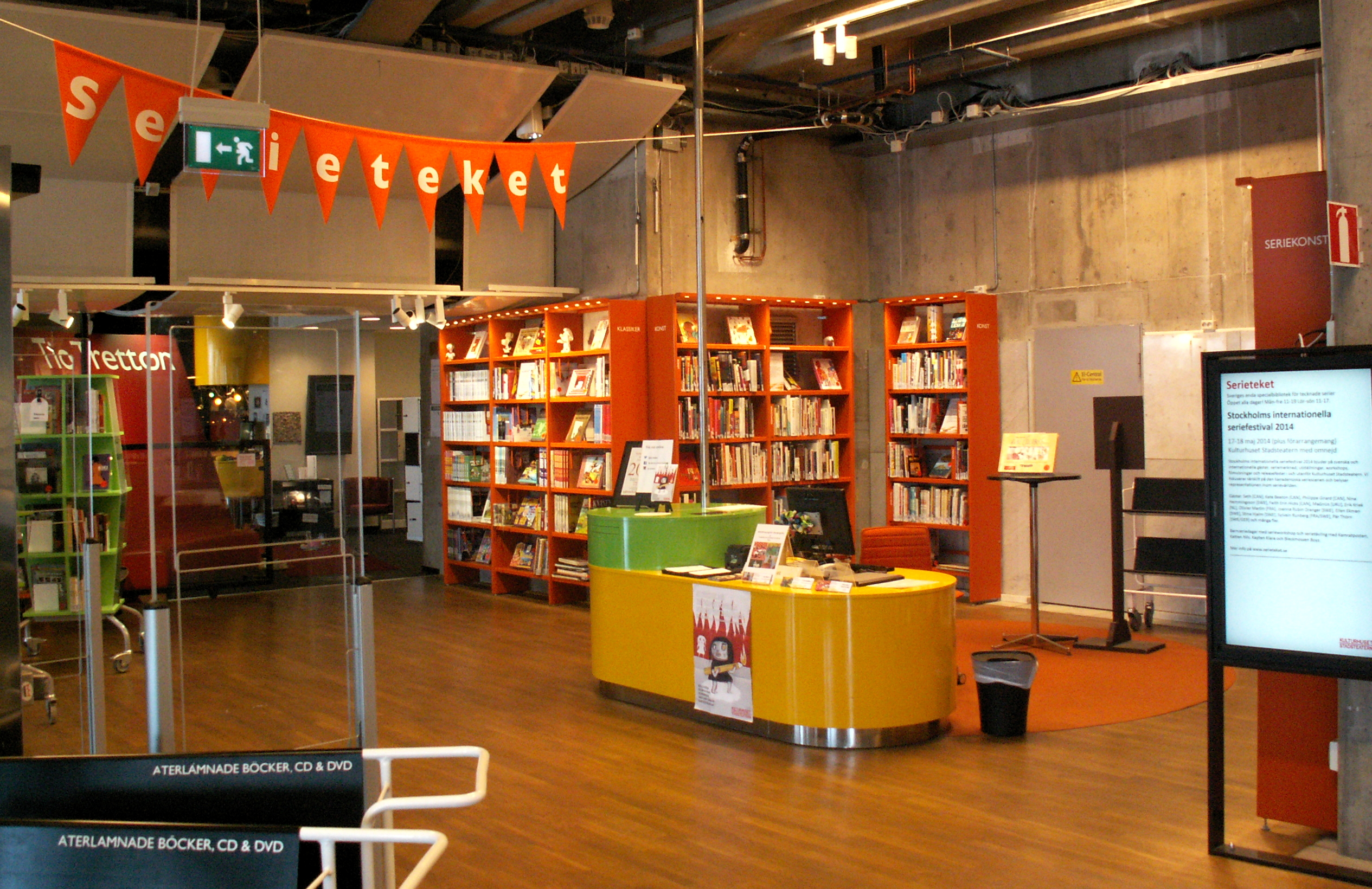 Serieteket anno 2014, placerad på våningsplan 2, runt trappschaktet i Kulturhuset Stadsteatern och mellan systerbiblioteken TioTretton och Film & Musik.